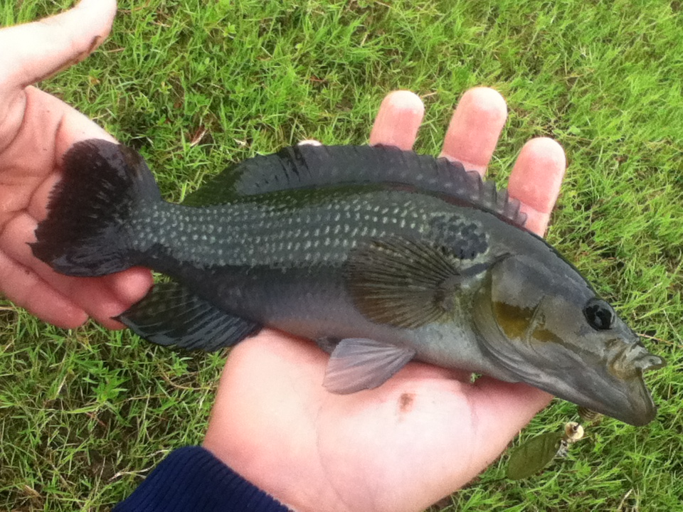 Ejemplar macho de Crenicichla lepidota, capturado en San José del Rincón, Santa Fe, Argentina.